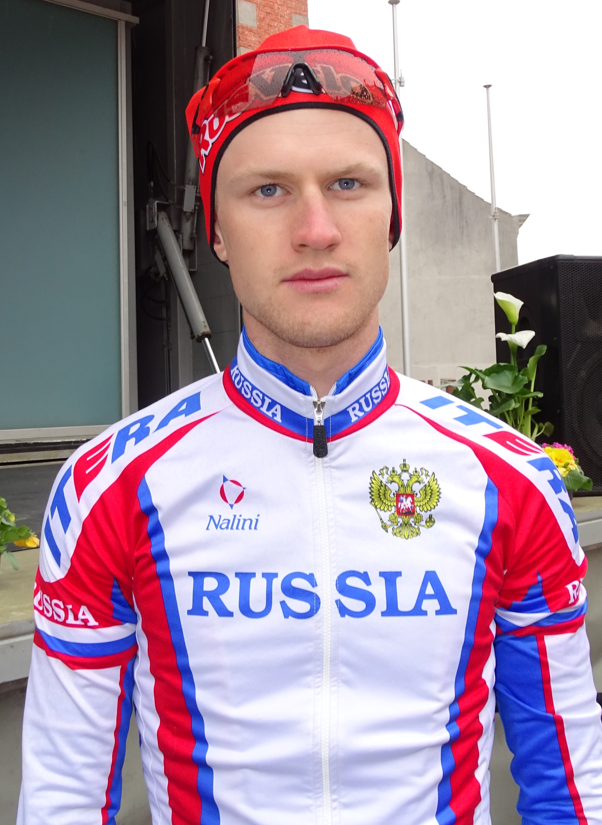 Triptyque des Monts et Châteaux 2015 Depicted person: Roman Kustadinchev Depicted team: Équipe nationale de Russie espoirs